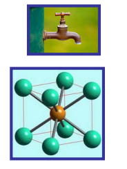 Cu-Zn sistema